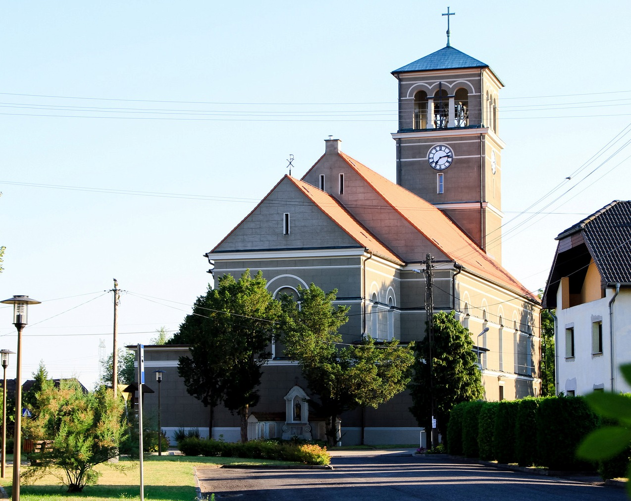 Kościół parafialny pw. św. Michała Archanioła, 1825-30, 1933, nr rej.: A/145/2011 z 10.02.2011 roku. Kościół zlokalizowany jest przy ul. Michała 1 w Starych Siołkowicach (gm. Popielów, woj. opolskie).